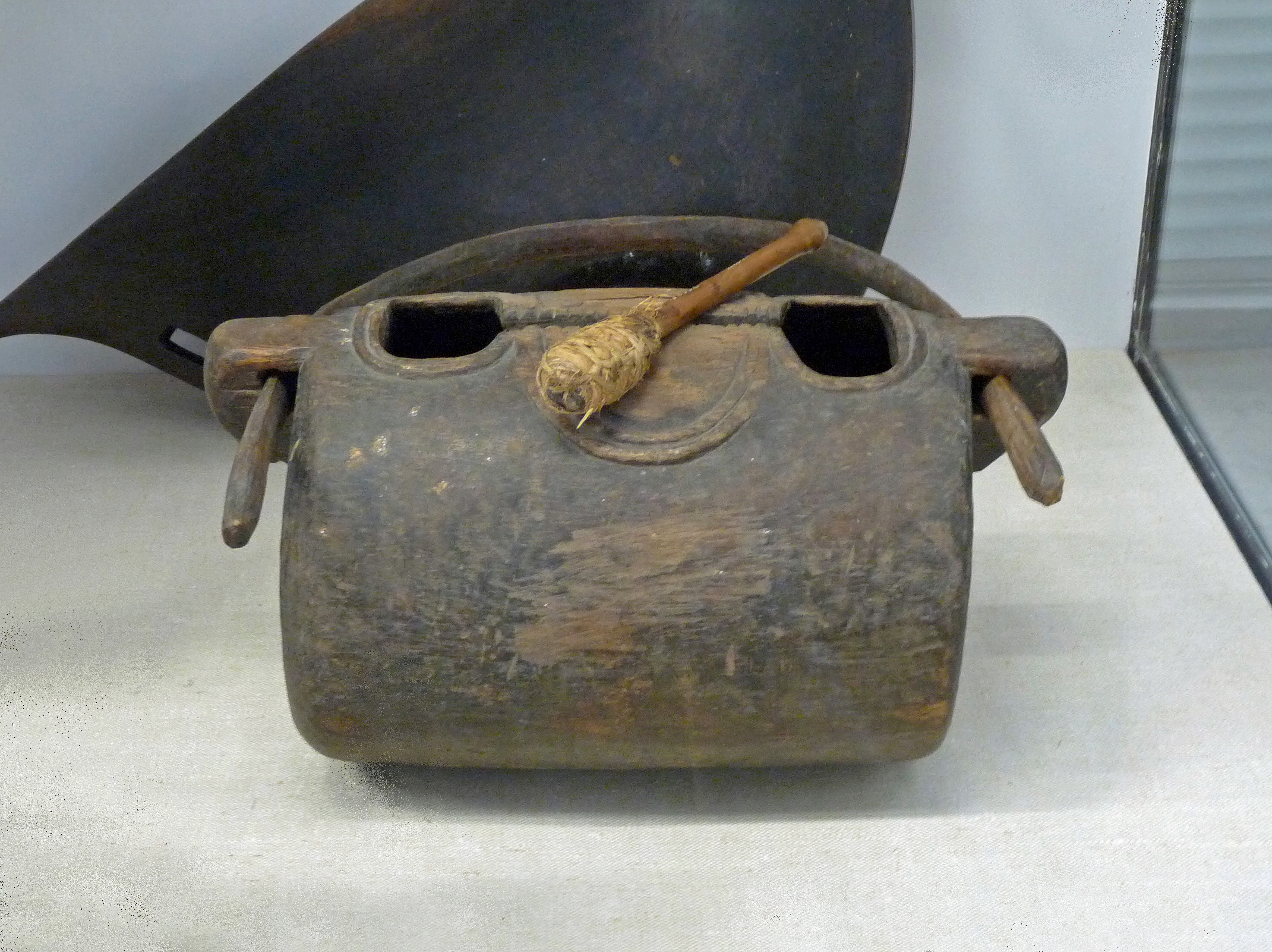 Tambour à fente Bangubangu. Zaïre. Musée royal de l'Afrique centrale, Tervuren, Belgique.